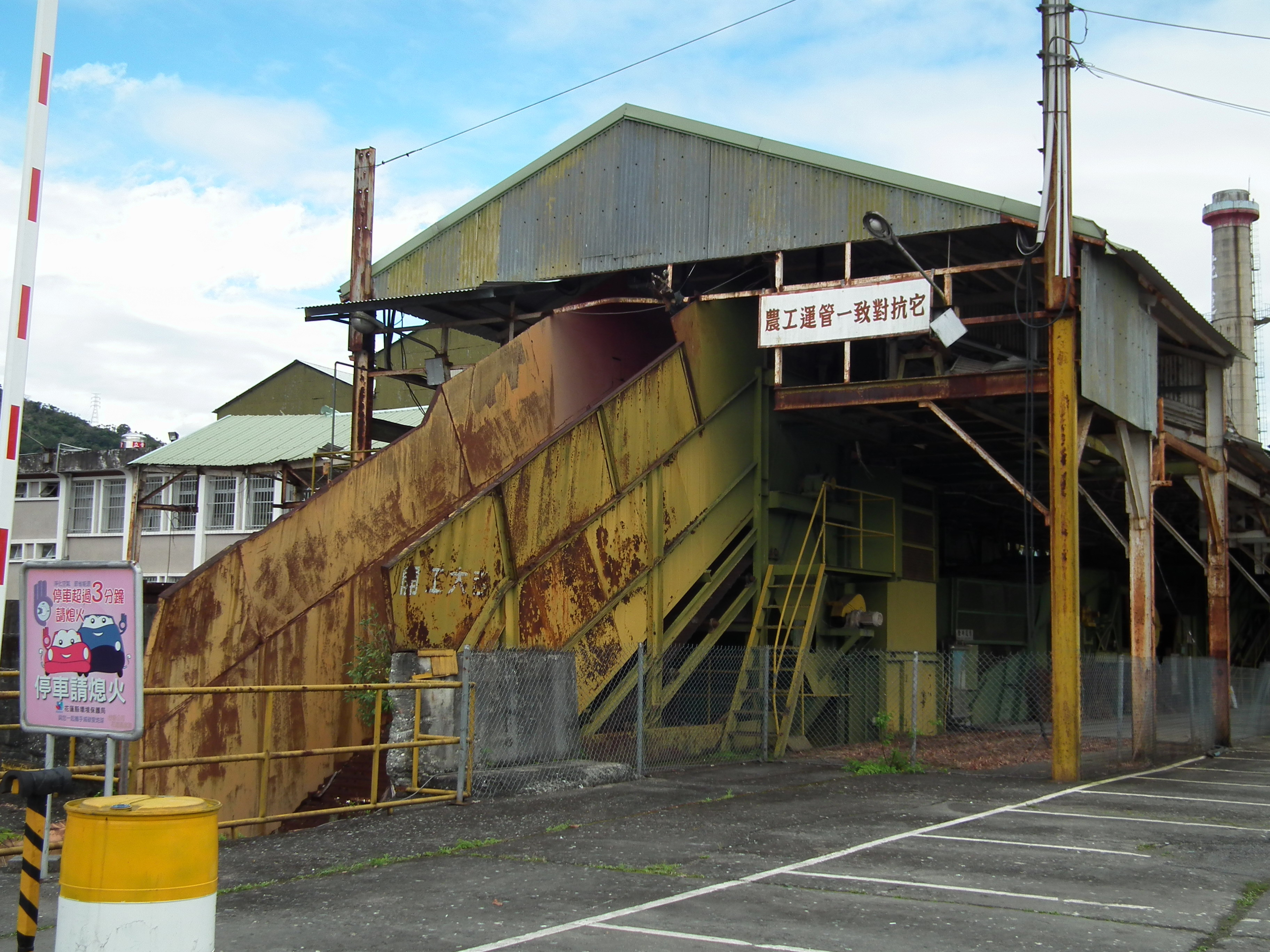 光復糖廠 Guangfu Sugar Refinery